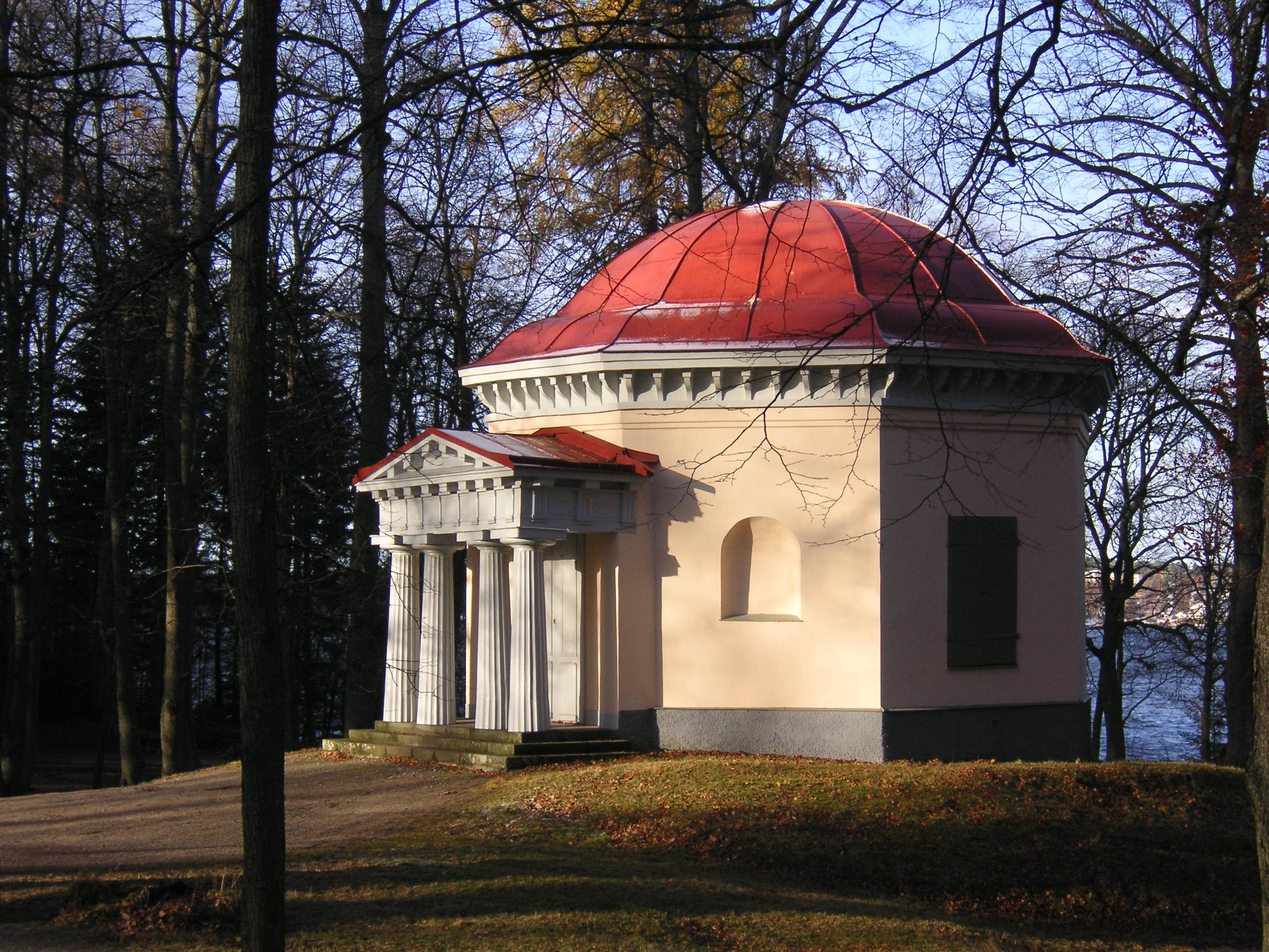 Norsborg i Botkyrka kommun Sverige, templet i parken vid Norsborgs herrgård